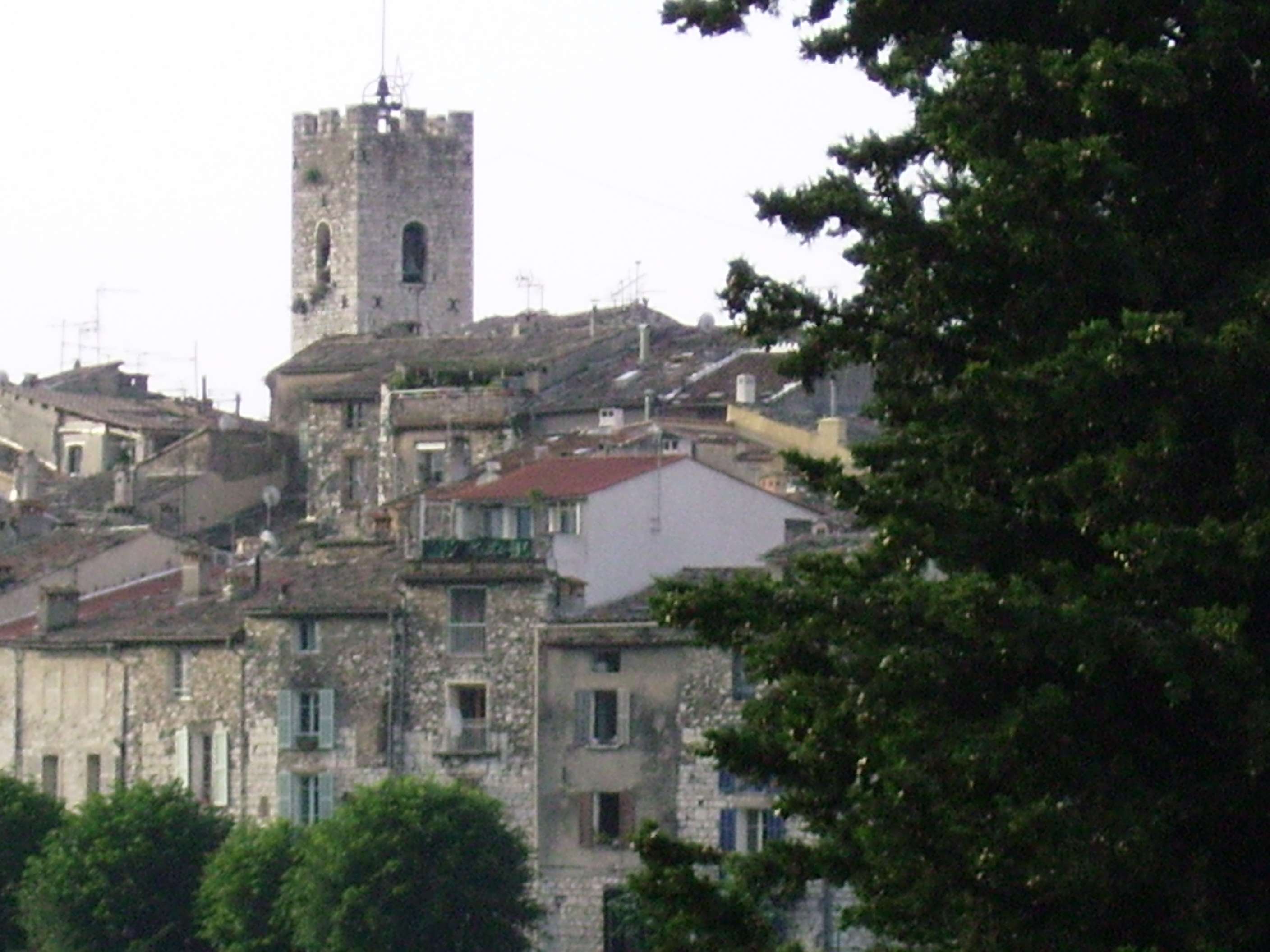 Vue de Vence (France)